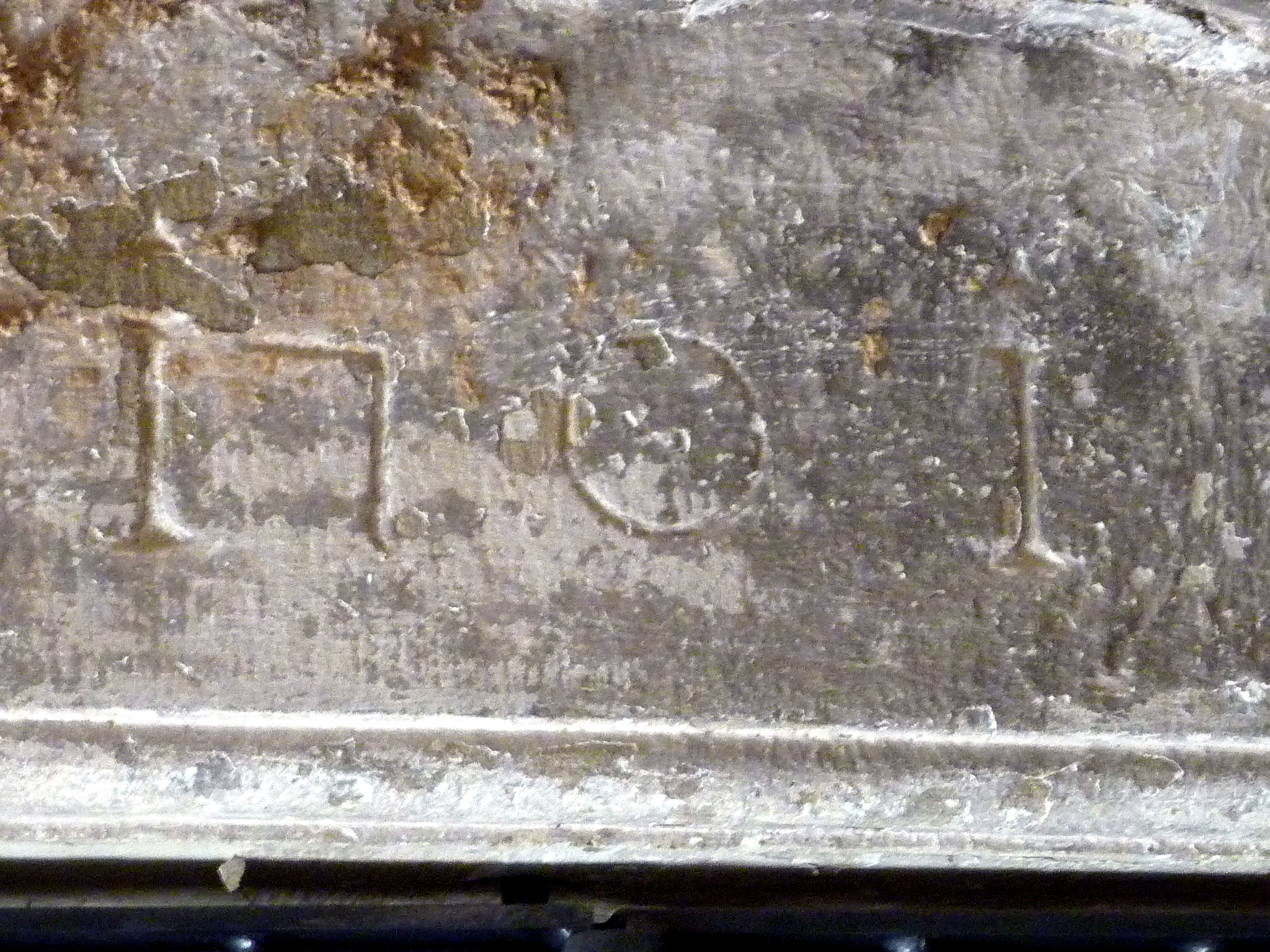 Capella de Sant Mateu de Comardons (Castellar de la Ribera): data a la llinda de la capella